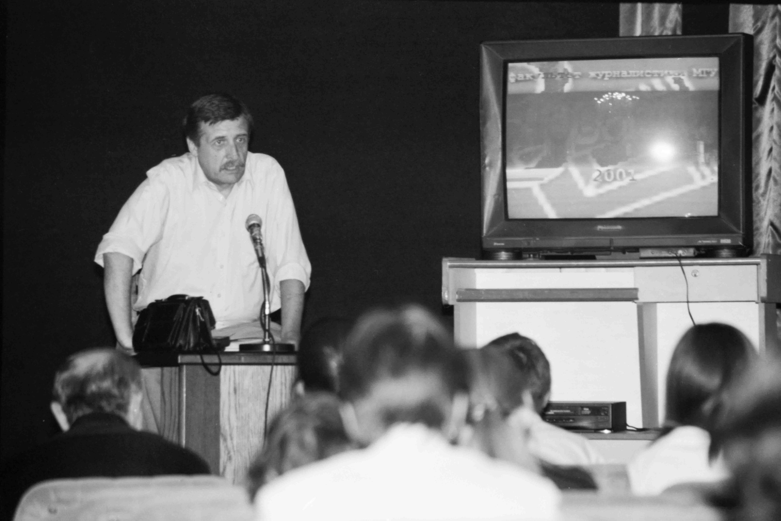 Журналист Владимир Мезенцев на занятии в Школе тележурналистики, рекламы и паблик рилейшнз в Центральном доме журналиста (Школе журналистики имени Владимира Мезенцева в Домжуре). Дата создания указана не точно.